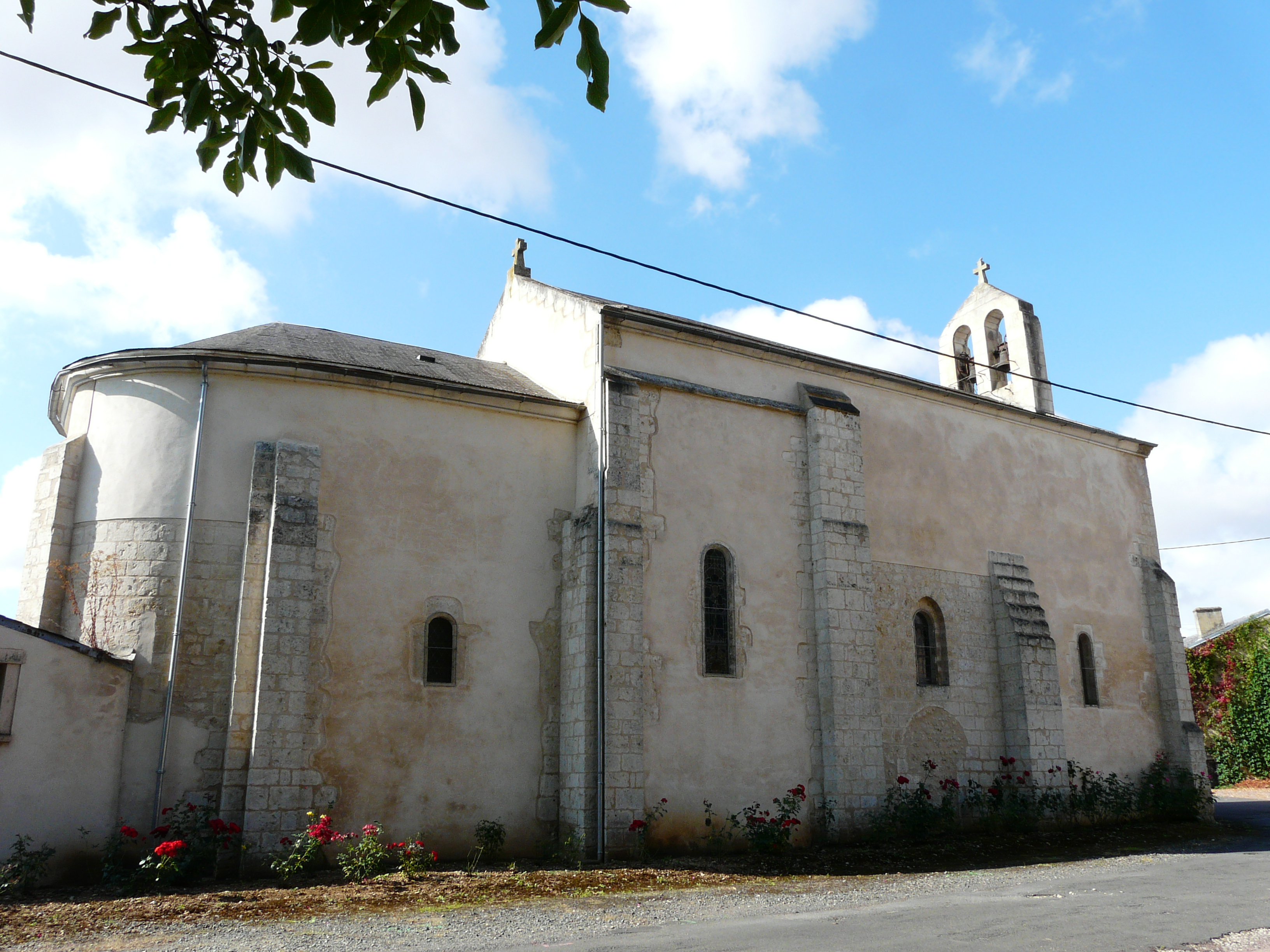 L'église Saint-Cybard de La Grimaudière, Vienne, France.